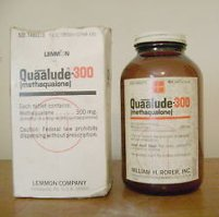 Метаквалон